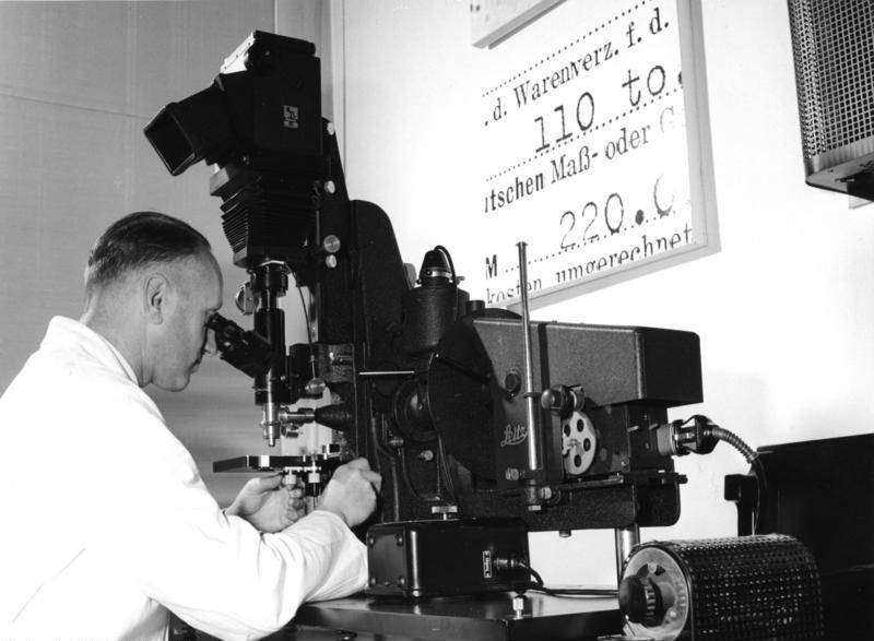 1961 Köln Zollkrimminalinstitut Mikrokospische Untersuchung bei auffallendem Licht